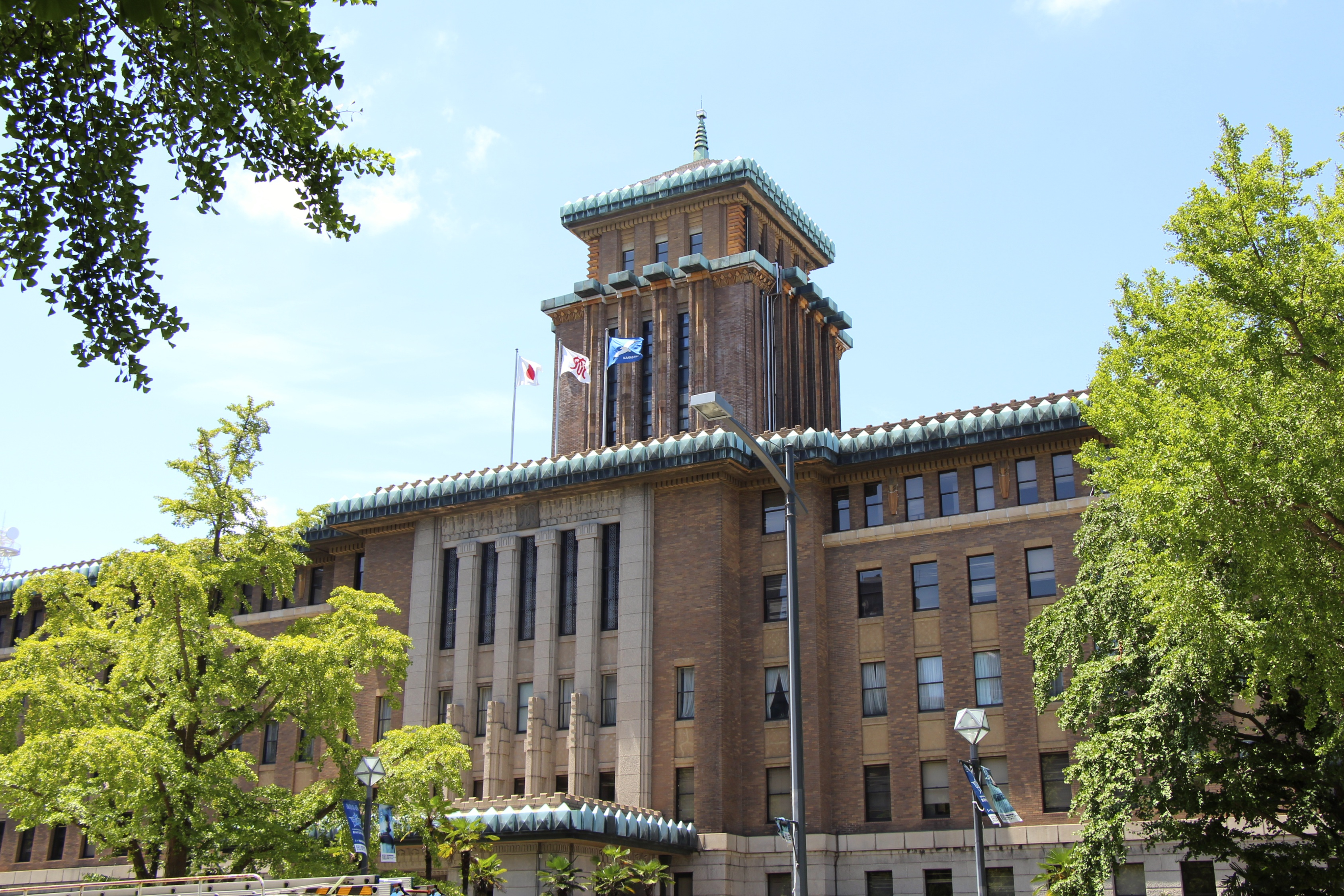 神奈川県庁舎 正面